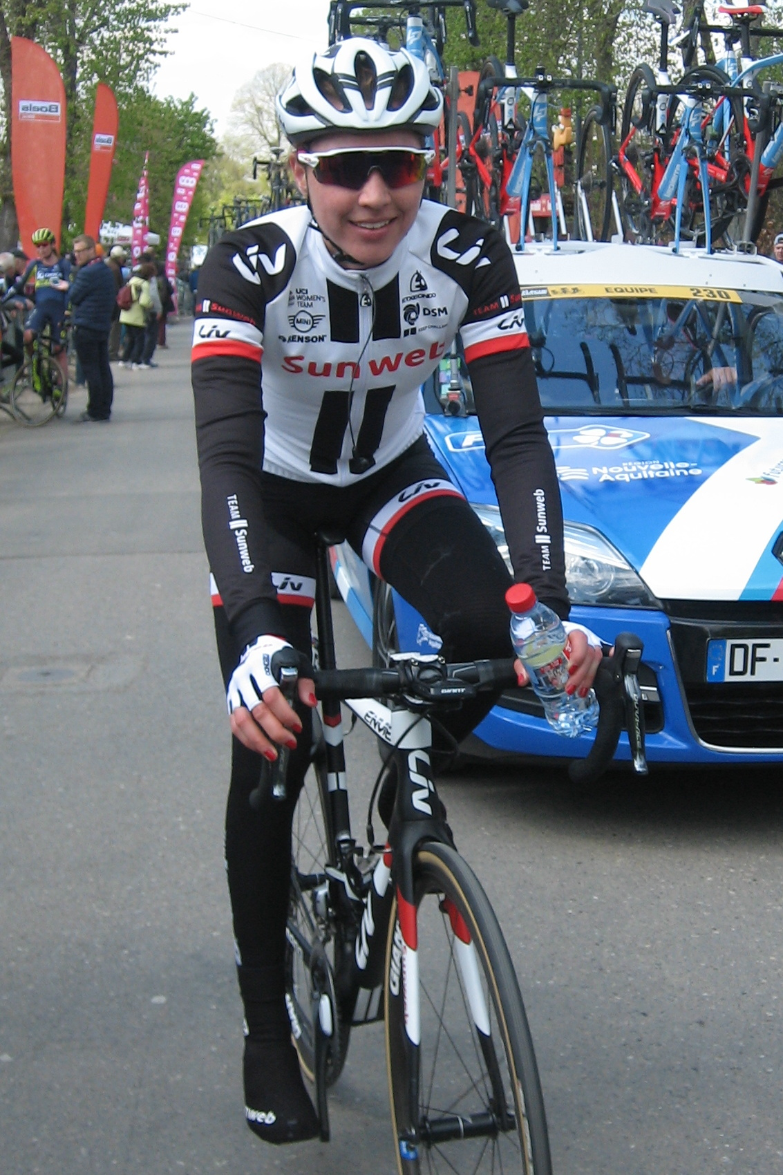 Sabrina Stultiens (Team Sunweb) na finish van Waalse Pijl 2017